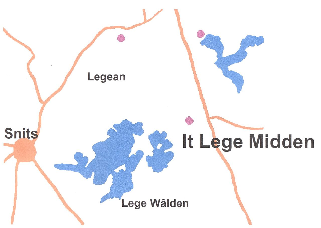 Het Lage Midden van Fryslân